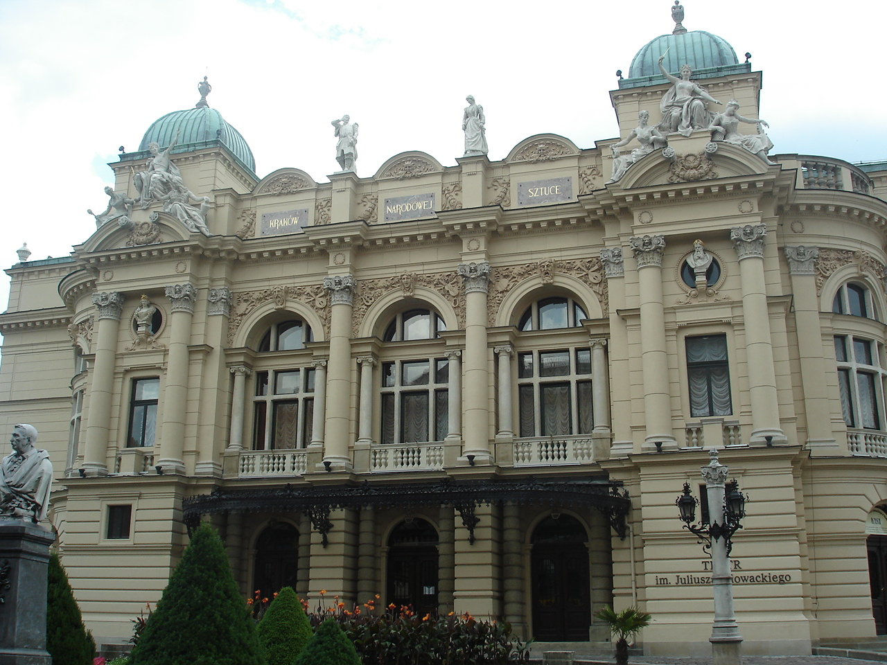 Kraków, Poland